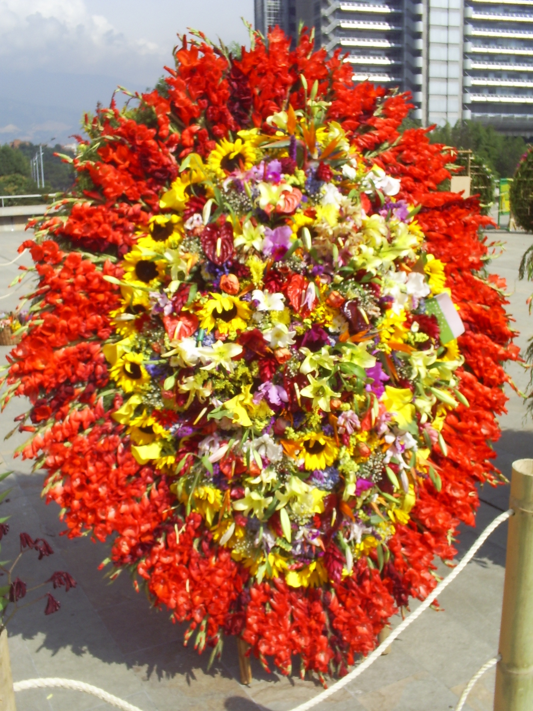 Desfile de Silleteros 2007, silletas expuestas después del desfile. Medellín, Colombia.